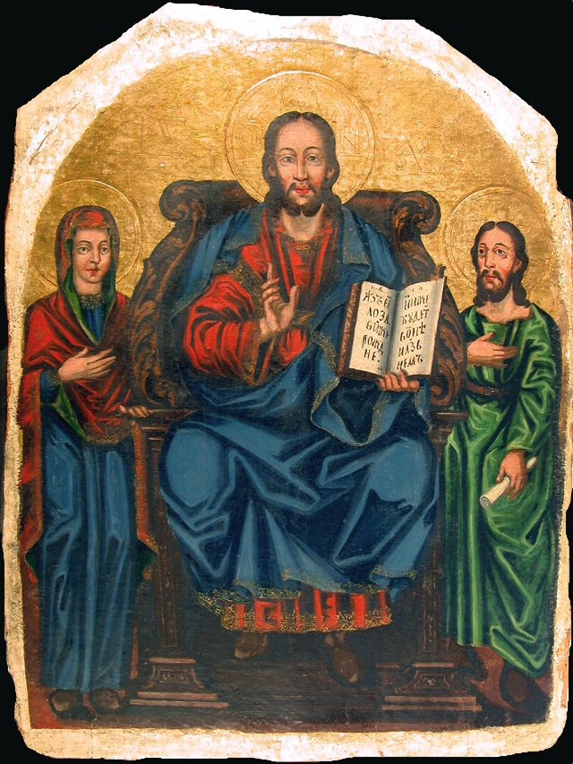 Икона "Христос Учитель" с Богородицей и Иоанном Крестителем из собрания Донецкого областного художественного музея.